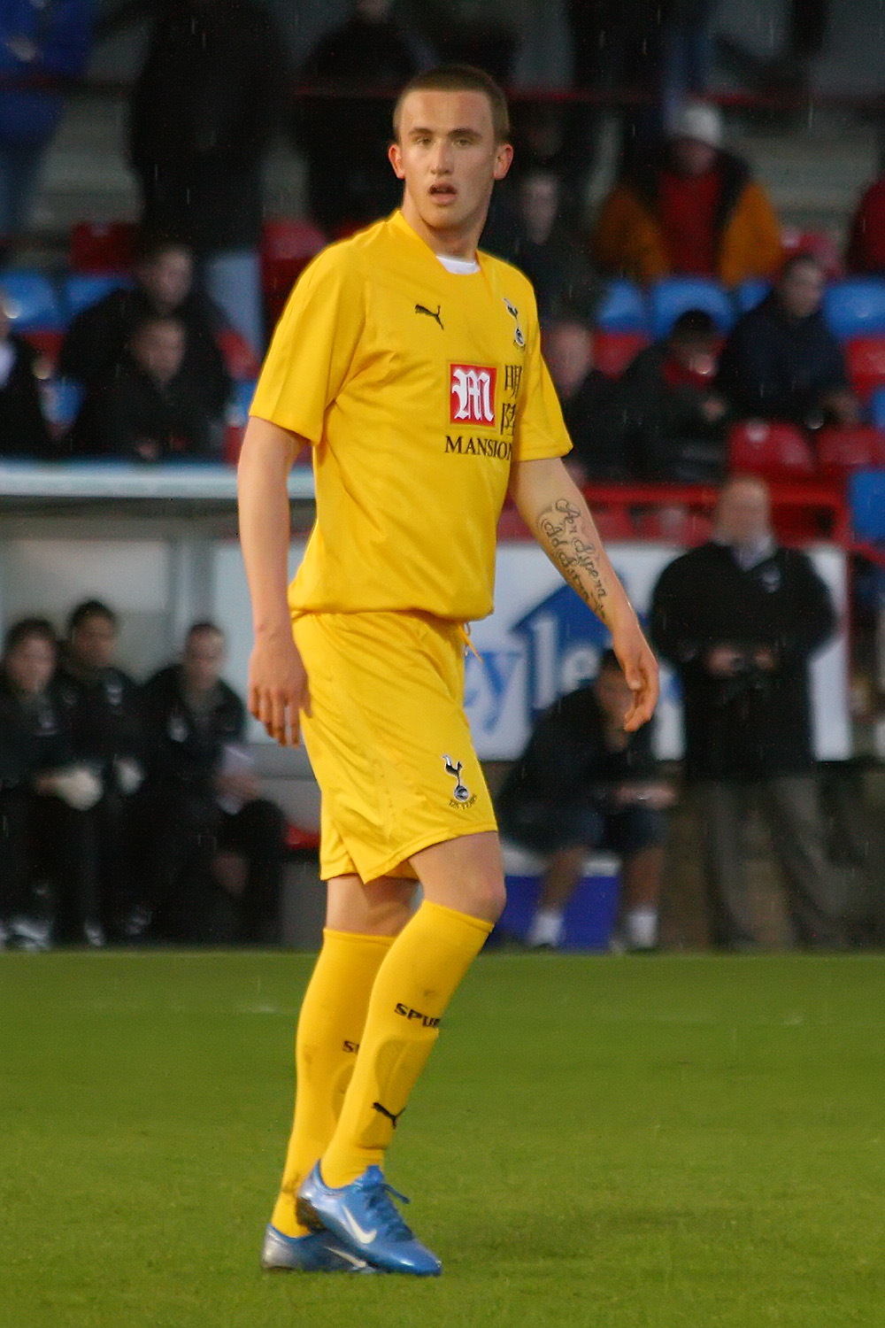 Tomáš Pekhart playing for Tottenham Hotspur